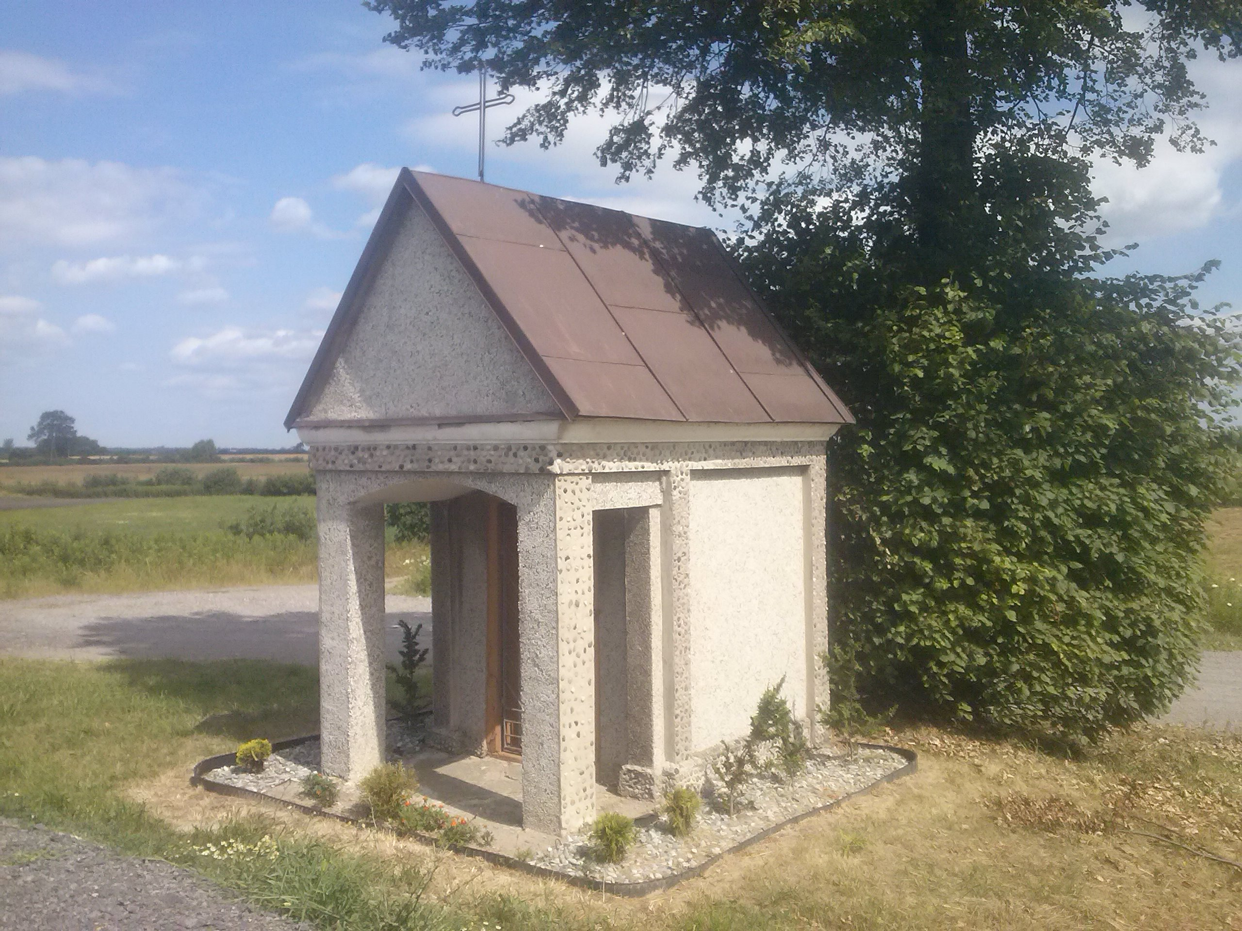 Kapliczka Matki Bożej w Dębnie